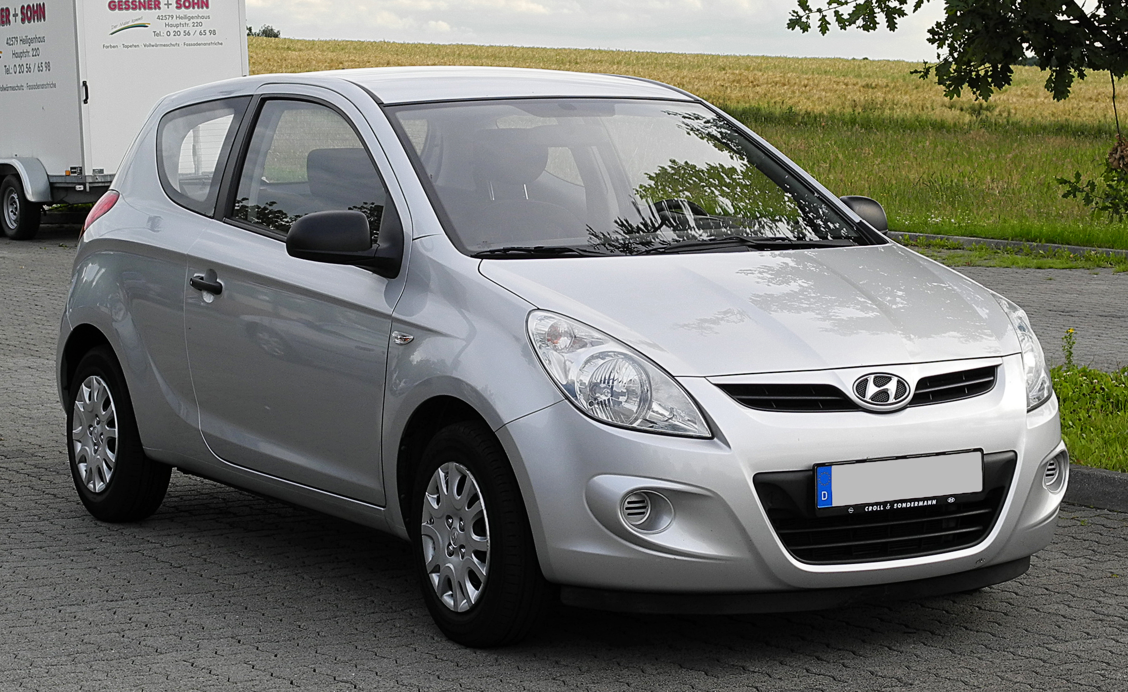 Hyundai i20 1.2 Classic